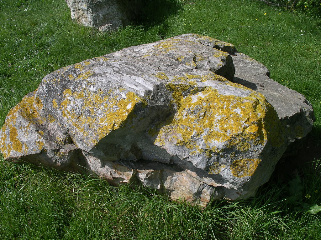 Polissoir néolithique à Ouilly-le-Tesson (Calvados) Il a été découvert lors de travaux agricoles et placé près de l'abri-bus d'Assy.